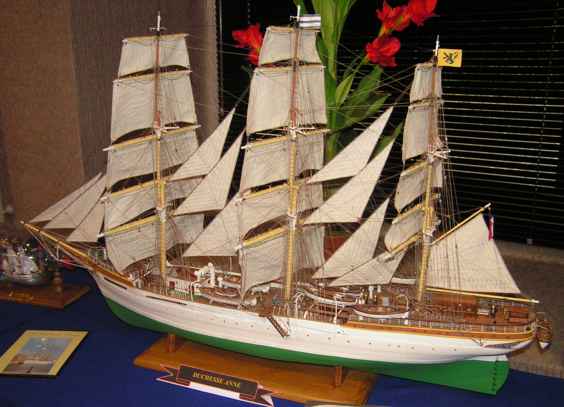 Maquette au 1/75° du trois-mâts carré Duchesse Anne (Musée portuaire de Dunkerque, Nord, France).